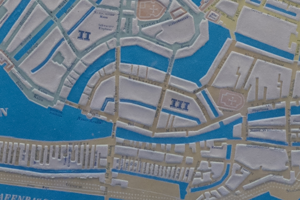 Ausschnitt mit der Cremon-Insel aus einem Stadtplan des Verlags C. R. Brunnarius (Paris) von 1841. Die orangenen Straßen liegen im Kirchspiel St. Katharinen (III), die grünen Straßen im Kirchspiel St. Nicolai (II) und die gelben Straßen im Kirchspiel St. Petri.